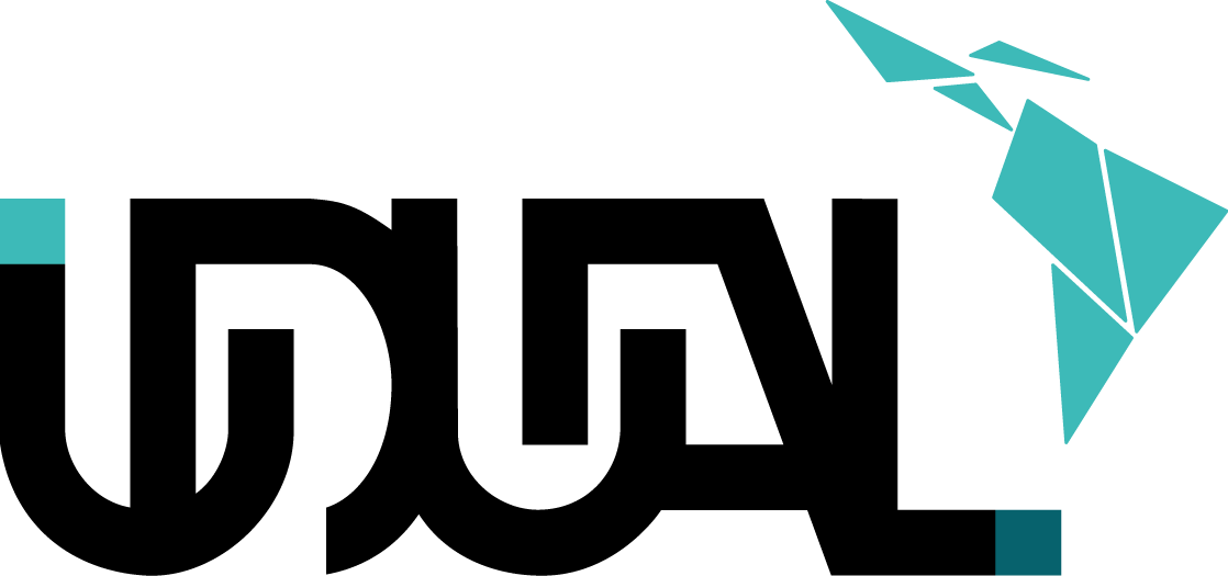 Logotipo actual de la Unión de Universidades de América Latina y el Caribe; en él están representadas las seis regiones que conforman la Unión.